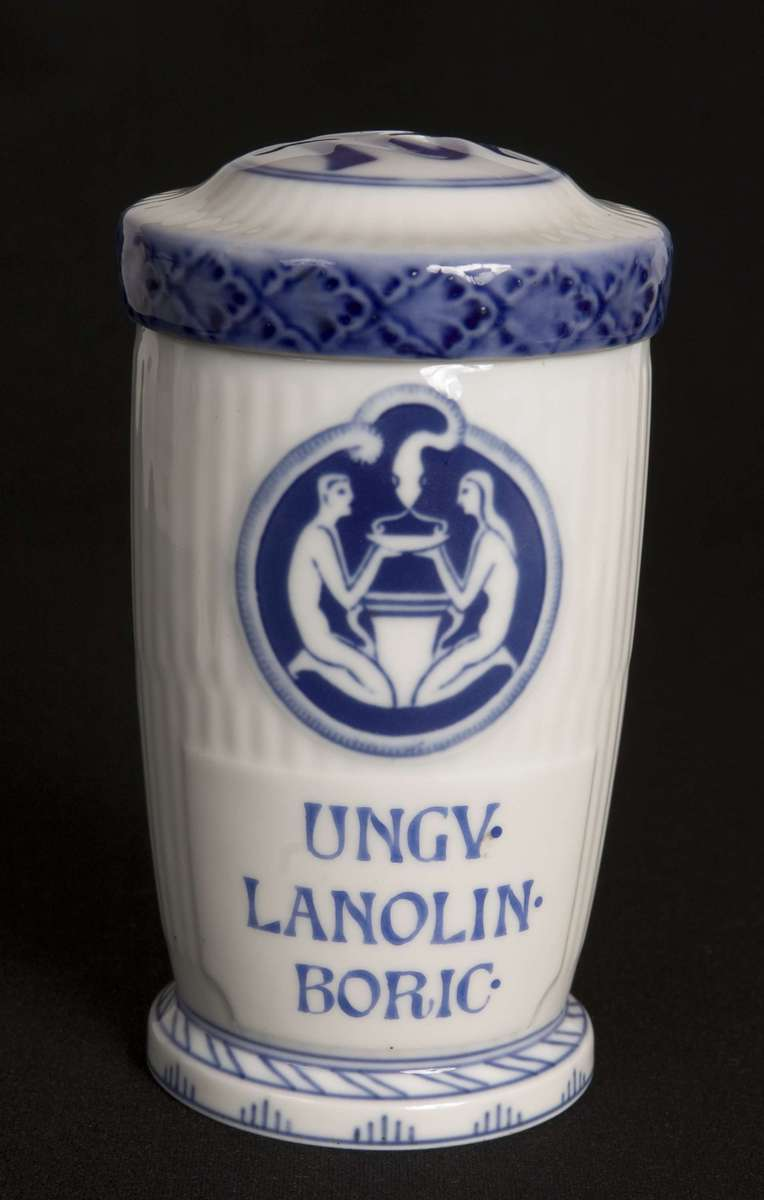 Standkar/standglass i Art déco. Ullevål apotek (fra 1923) fikk standkar fra Den Kongelige Porselainsfabrik i København med egen logo og bokstavene UA i koboltblått på lokket. Tilhører Norsk Farmasihistorisk Museum, Foto Gustav Borgen / Norsk Folkemuseum, NFA.13285AB.